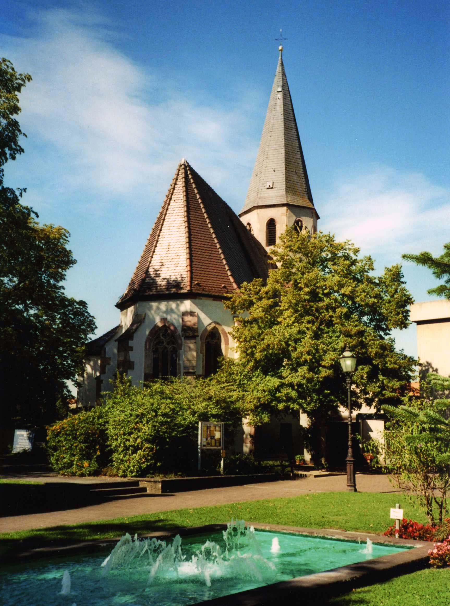 Evangelische Kirche Eggenstein aus nordöstlicher Richtung